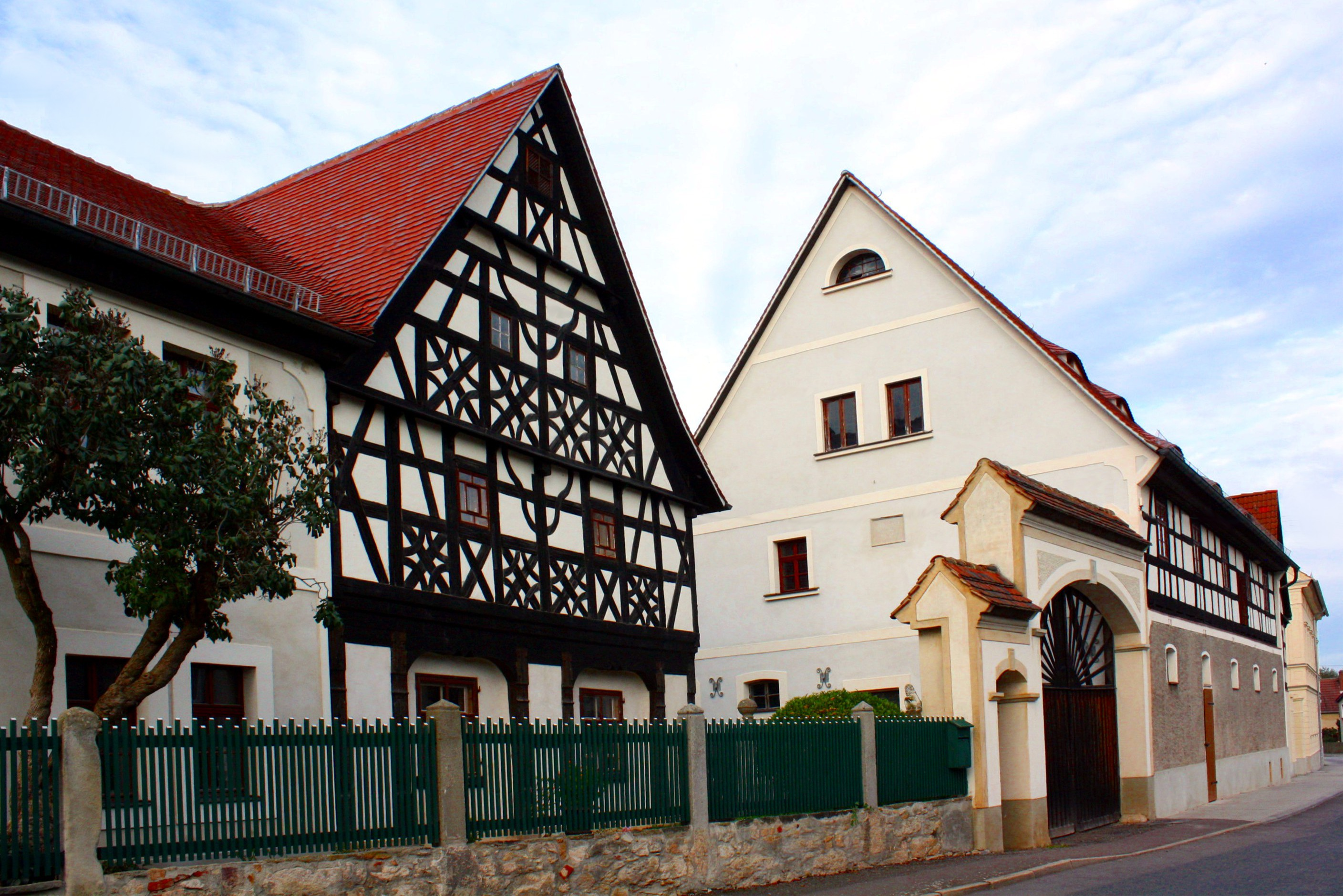 Vierseithof im Trebener Ortsteil Lehma im ostthüringischen Altenburger Land